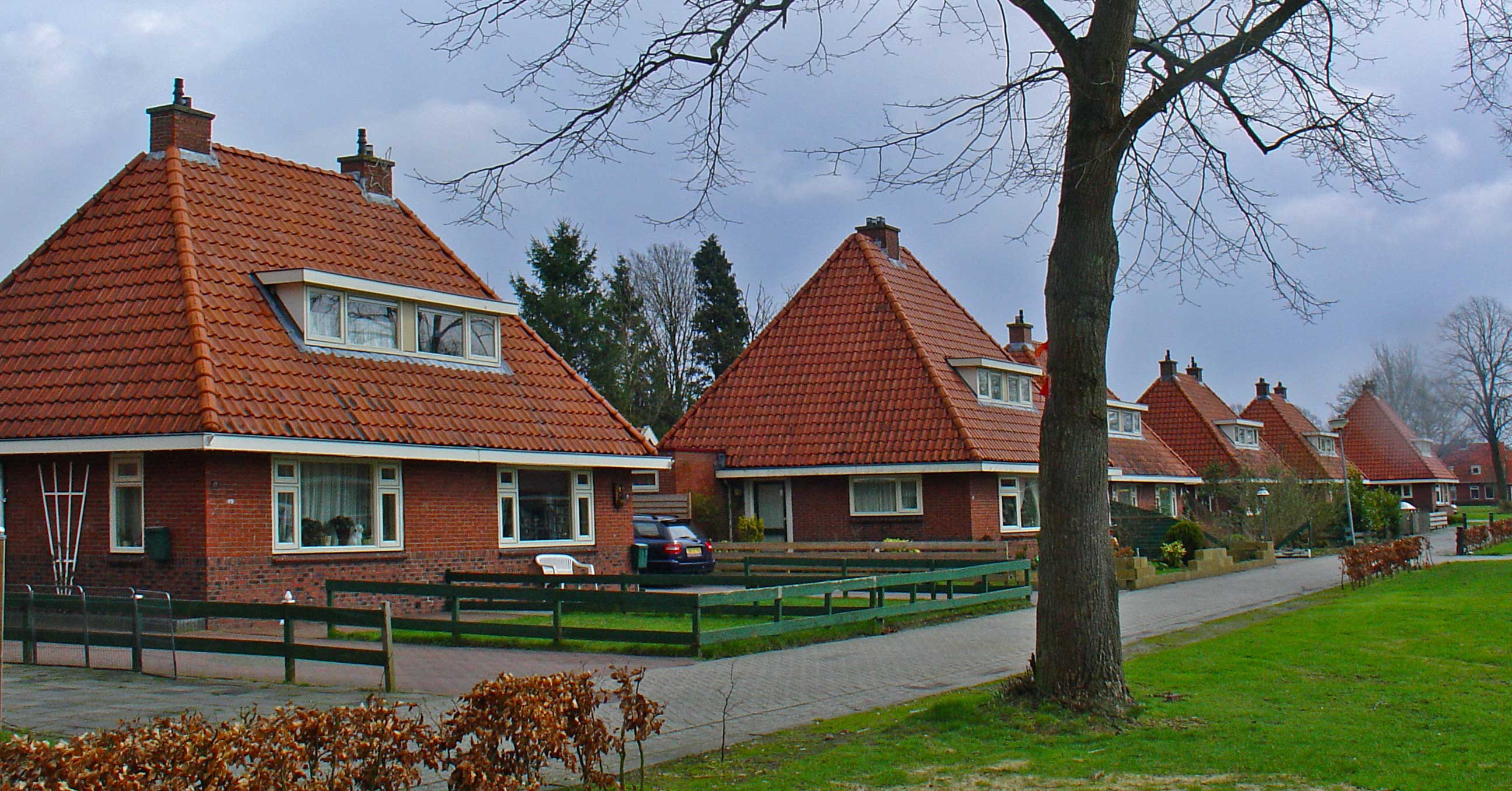 Monumentale arbeiderswoningen in de Oranjestraat in Stadskanaal